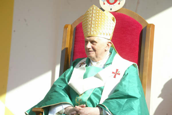 Benedetto XVI in visita pastorale a Velletri (Roma)